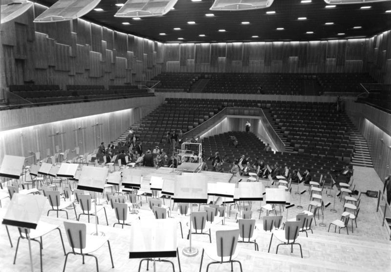 22.9.1959 West-Berlin: Neuer Sendesaal des Sender Freies Berlin, Masurenallee